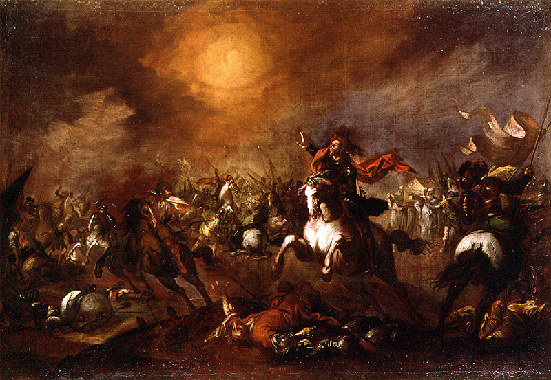 La obra representa a Josué, que fue el primer juez de Israel, deteniendo el sol durante una batalla librada durante la conquista de la tierra prometida.